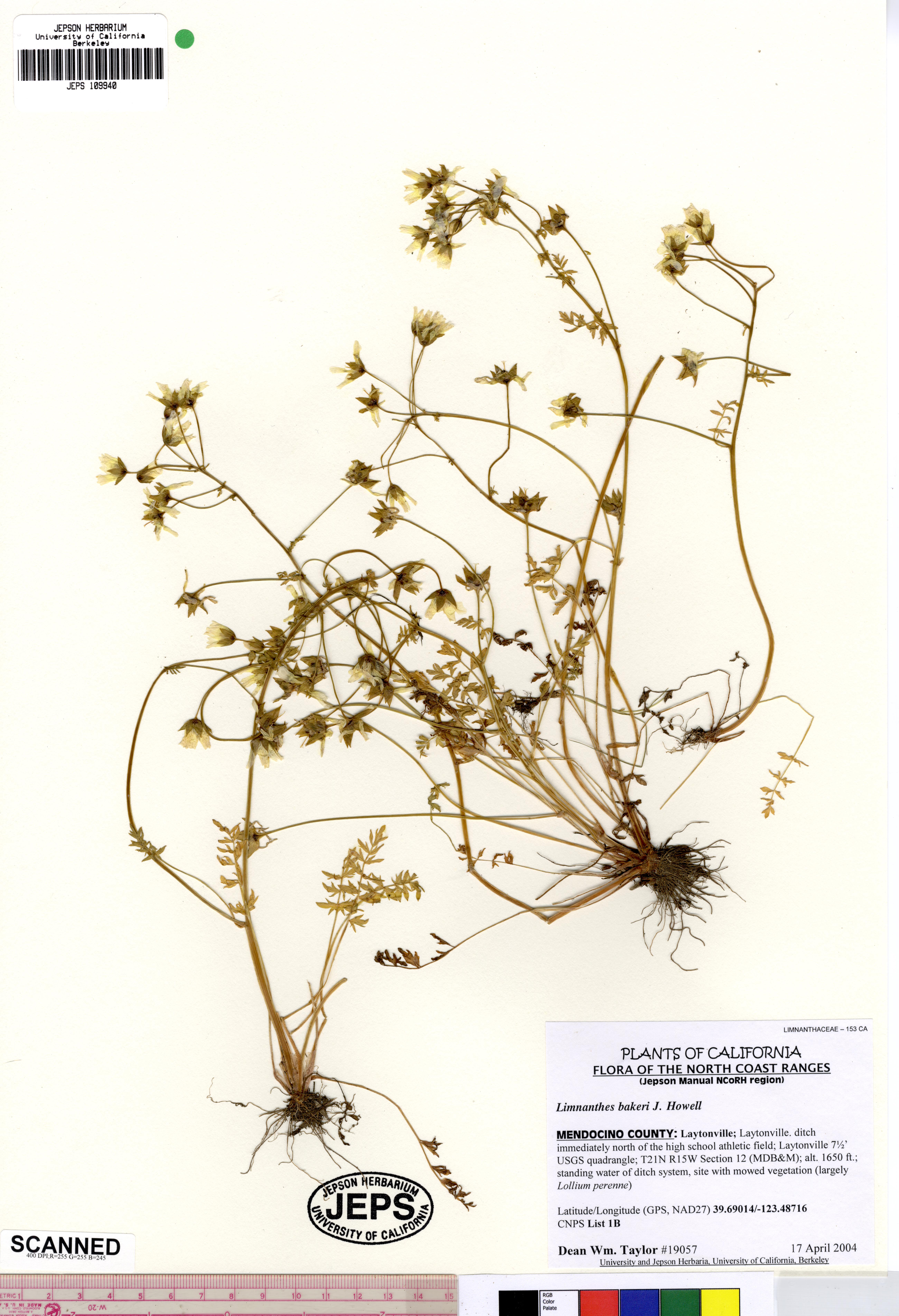 Limnanthes bakeri JEPS109940